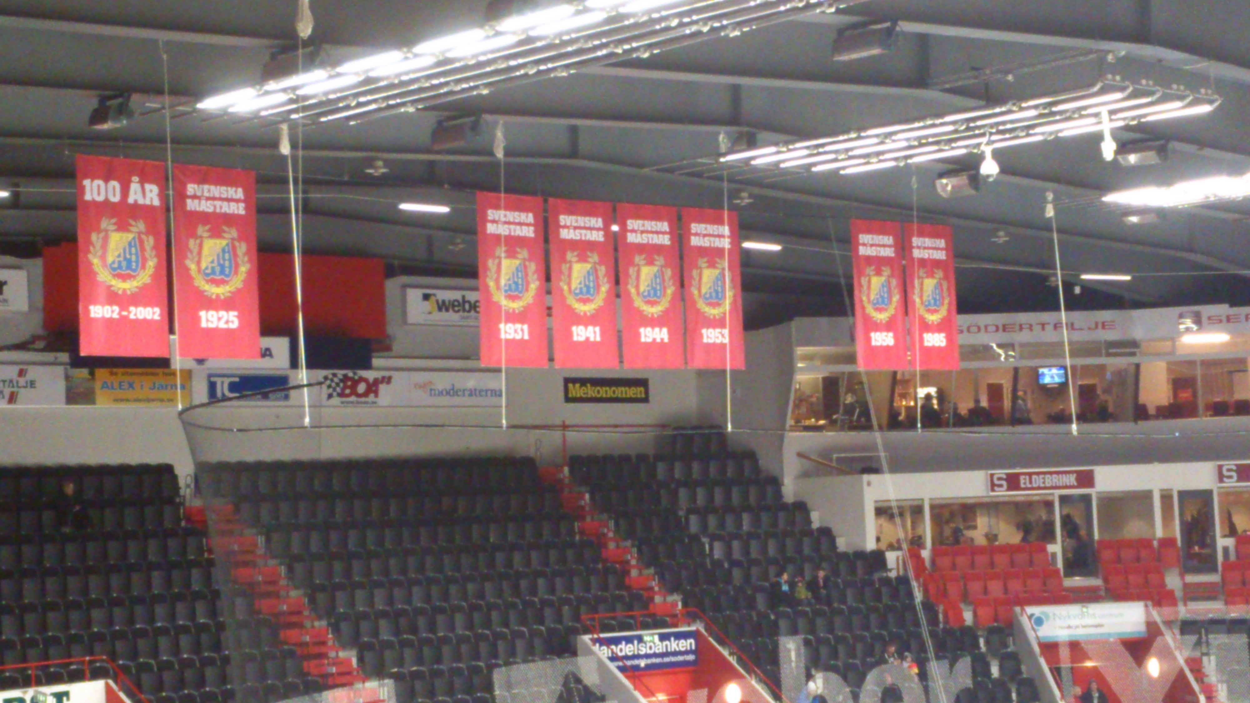 AXA Sports Center i Södertälje februari 2013